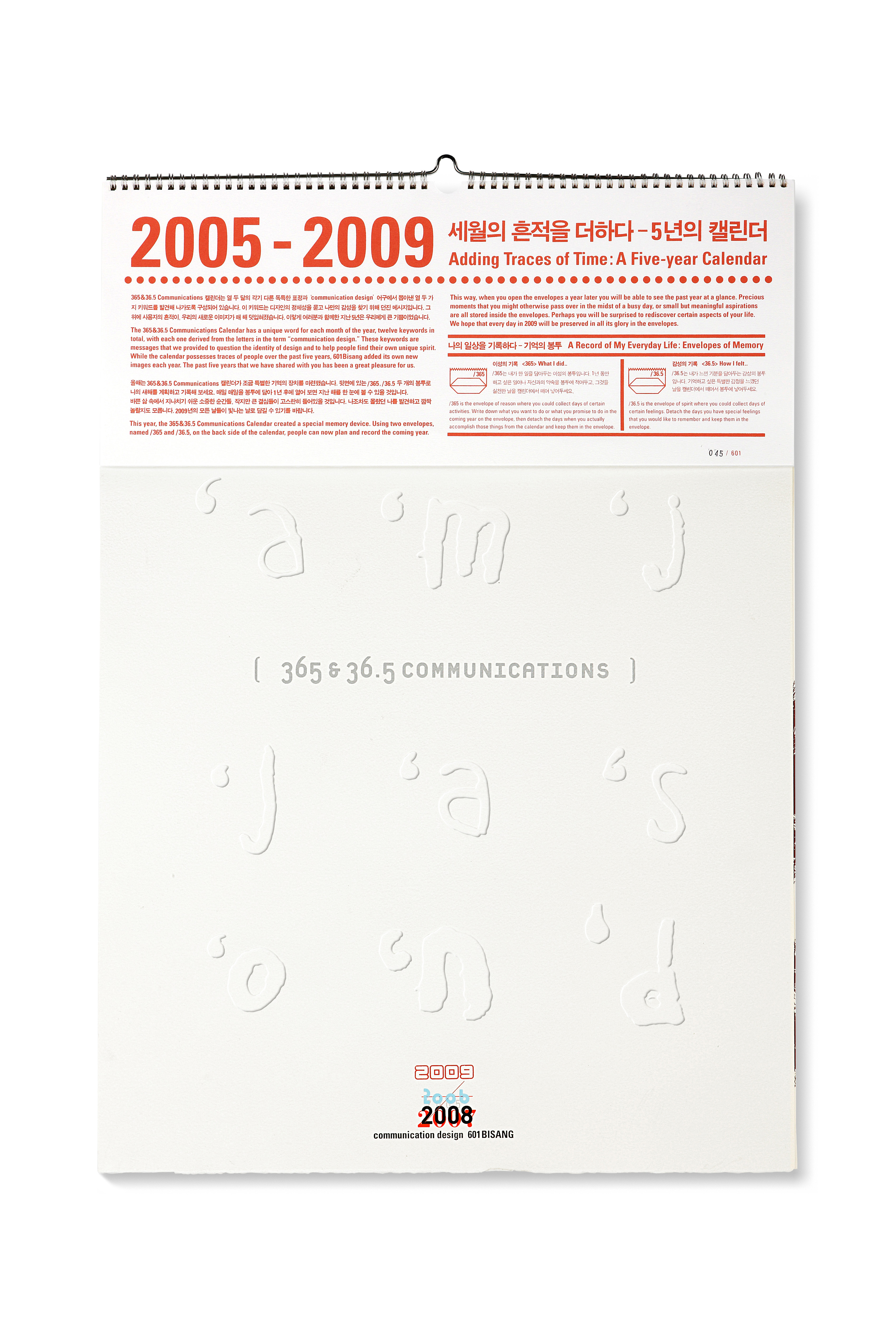 365&36.5 communication